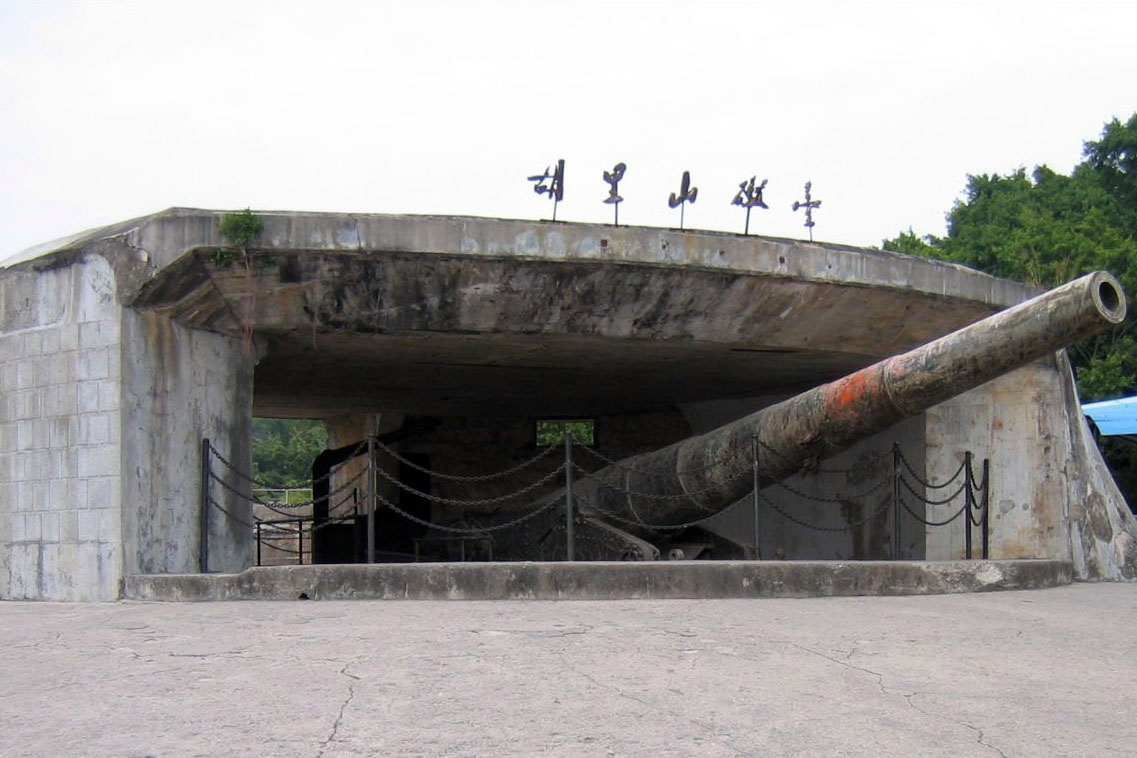 胡里山炮台，位于中国福建省厦门市，是全国重点文物保护单位。